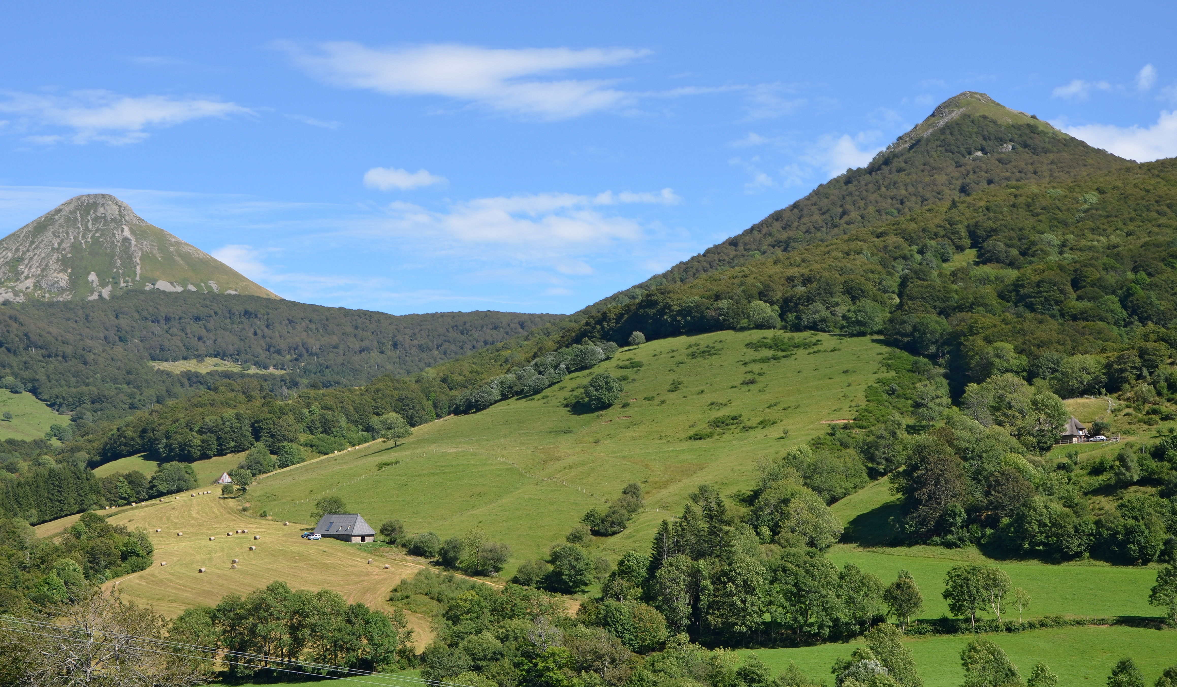 Haut de la vallée de la Jordanne, Massif Central, Cantal, France.